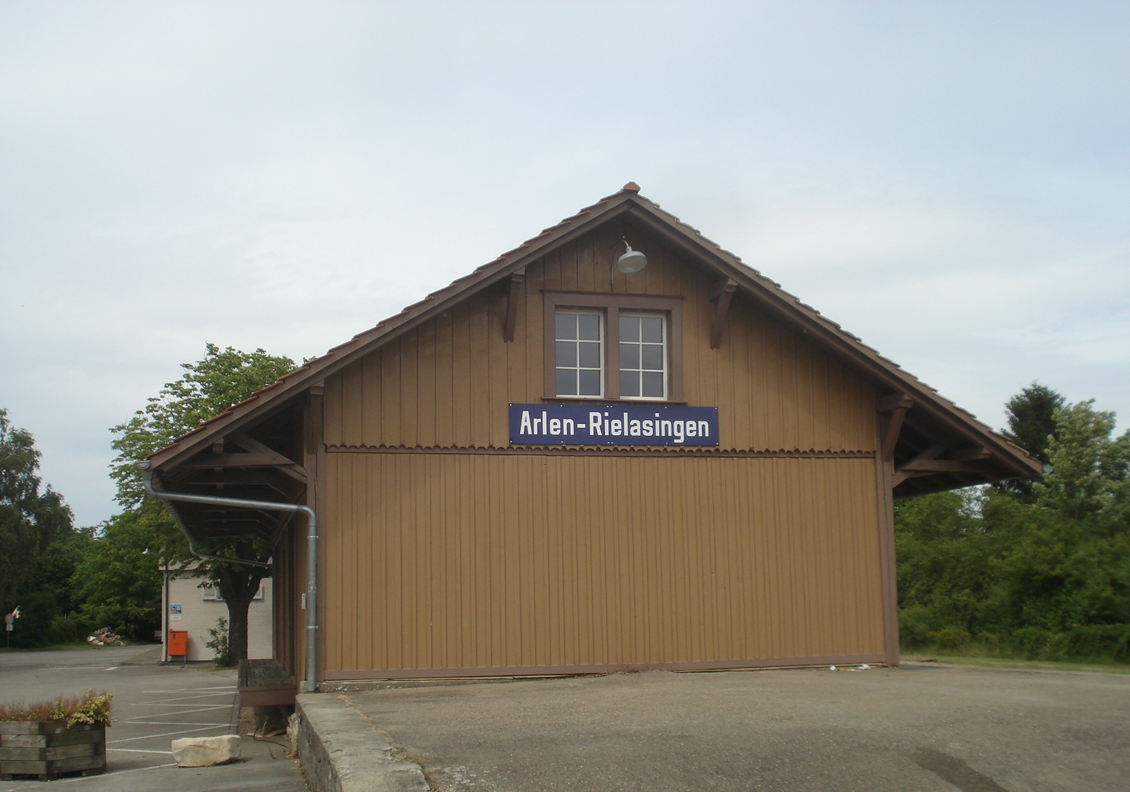 Vor diesem Bahnhof findet seit 2011 jährlich ein Museumsbahnfest statt.